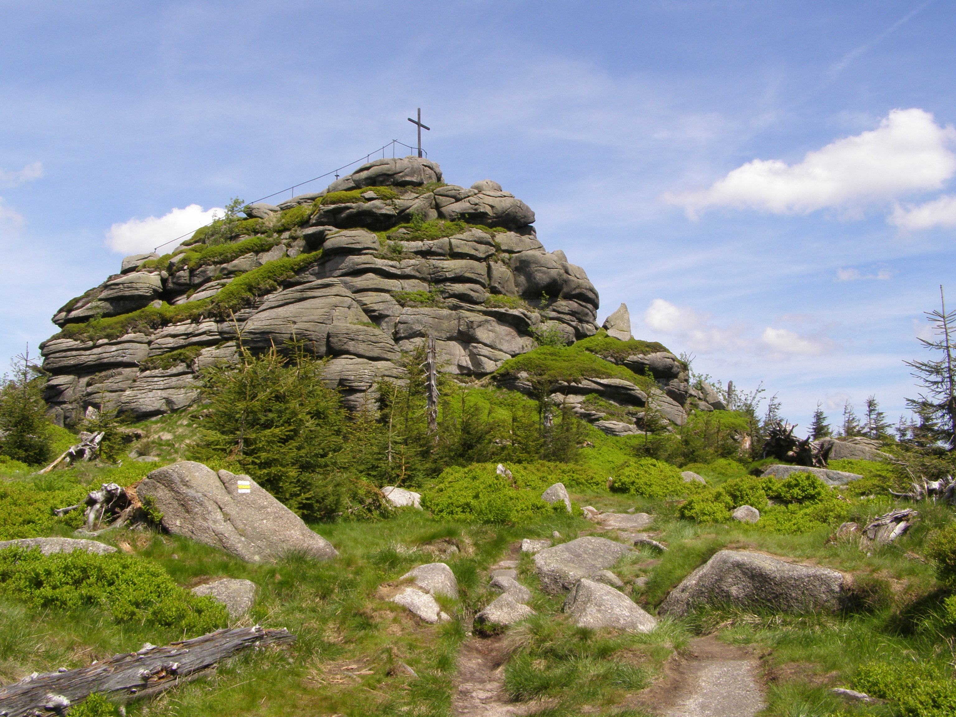 Česky: Jizerské hory, Smědavská hornatina, vrchol Jizera (1122 m), okolo Prales Jizera